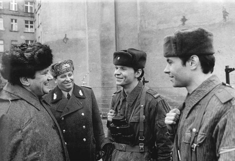 Berlin, Krack bei Grenztruppen ADN-ZB Franke 23.12.80 Berlin: Der Oberbürgermeister Erhard Krack (l.) besuchte Angehörige der Grenztruppen der DDR. Er wünschte dem Soldaten Andreas Bachmann (r.) aus Pirna und dem Gefreiten Andreas Nerlich (2.v.r.) aus Mosen (Bez.Gera) zum bestehenden Jahreswechsel alles Gute. Im Hintergrund Generalmajor Erich Wöllner, Kommandeur eines Verbandes der Grenztruppen der DDR. (Nur für Berlin-Redaktionen hauptstädtischer Zeitungen!) Sperrfrist bis 28.12.80 20.00 UHR!